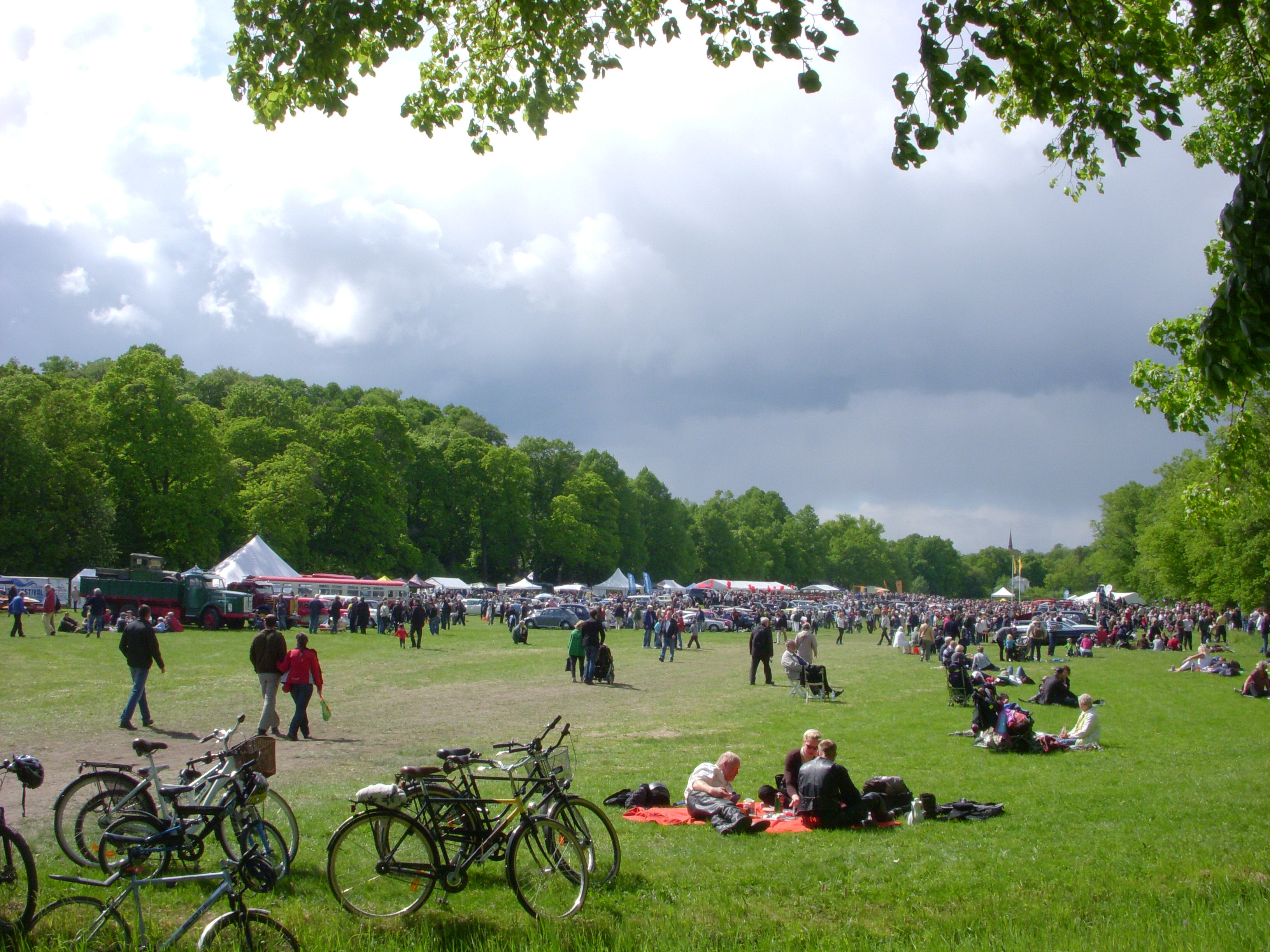 Gärdesloppet ”Prins Bertil Memorial”, Stockholm, maj 2011, Frisens park